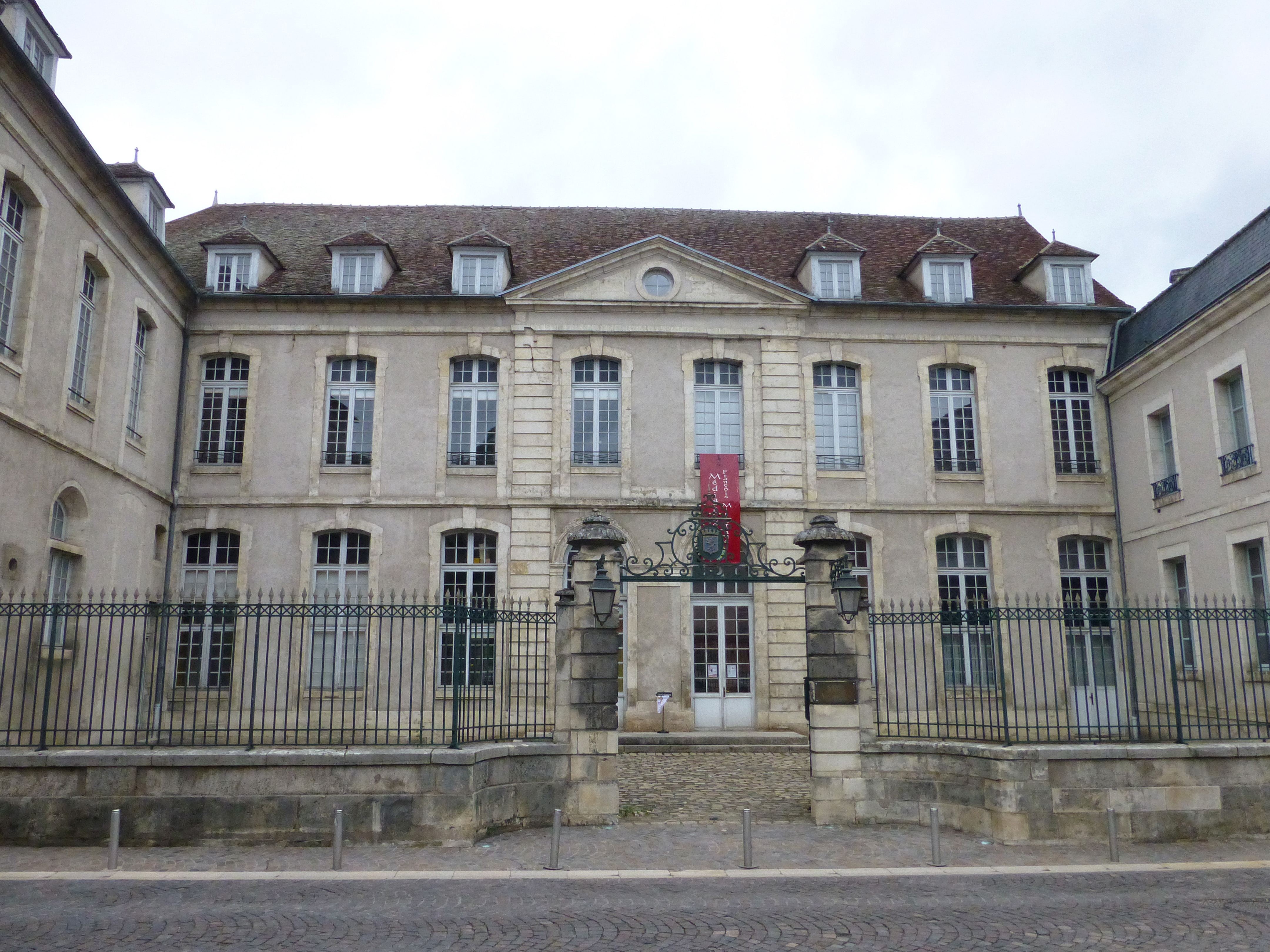 Médiathèque François-Mitterrand à Clamecy (Nièvre)